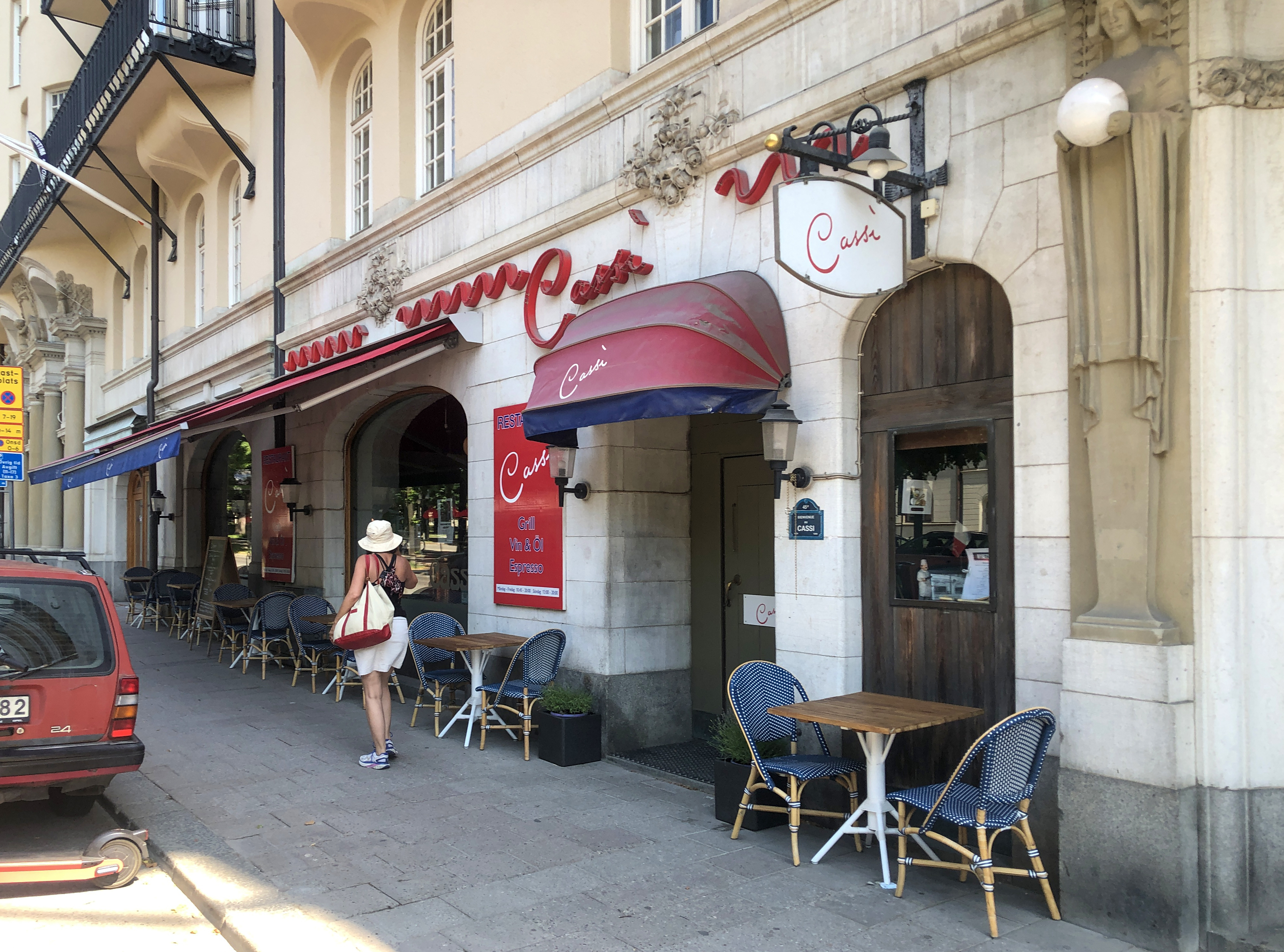 Restaurang Cassi, Narvanägen 30 Stockholm